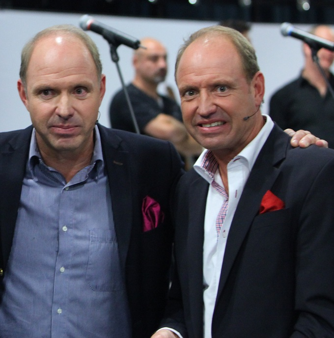 Tomas och Andreas Ravelli, 19 september 2010